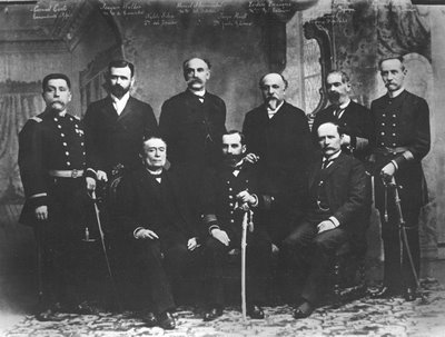 La Junta de Gobierno en Iquique se formó de los elementos del Congreso Nacional en pugna armada contra el gobierno de José Manuel Balmaceda conocida como la Guerra Civil de 1891.